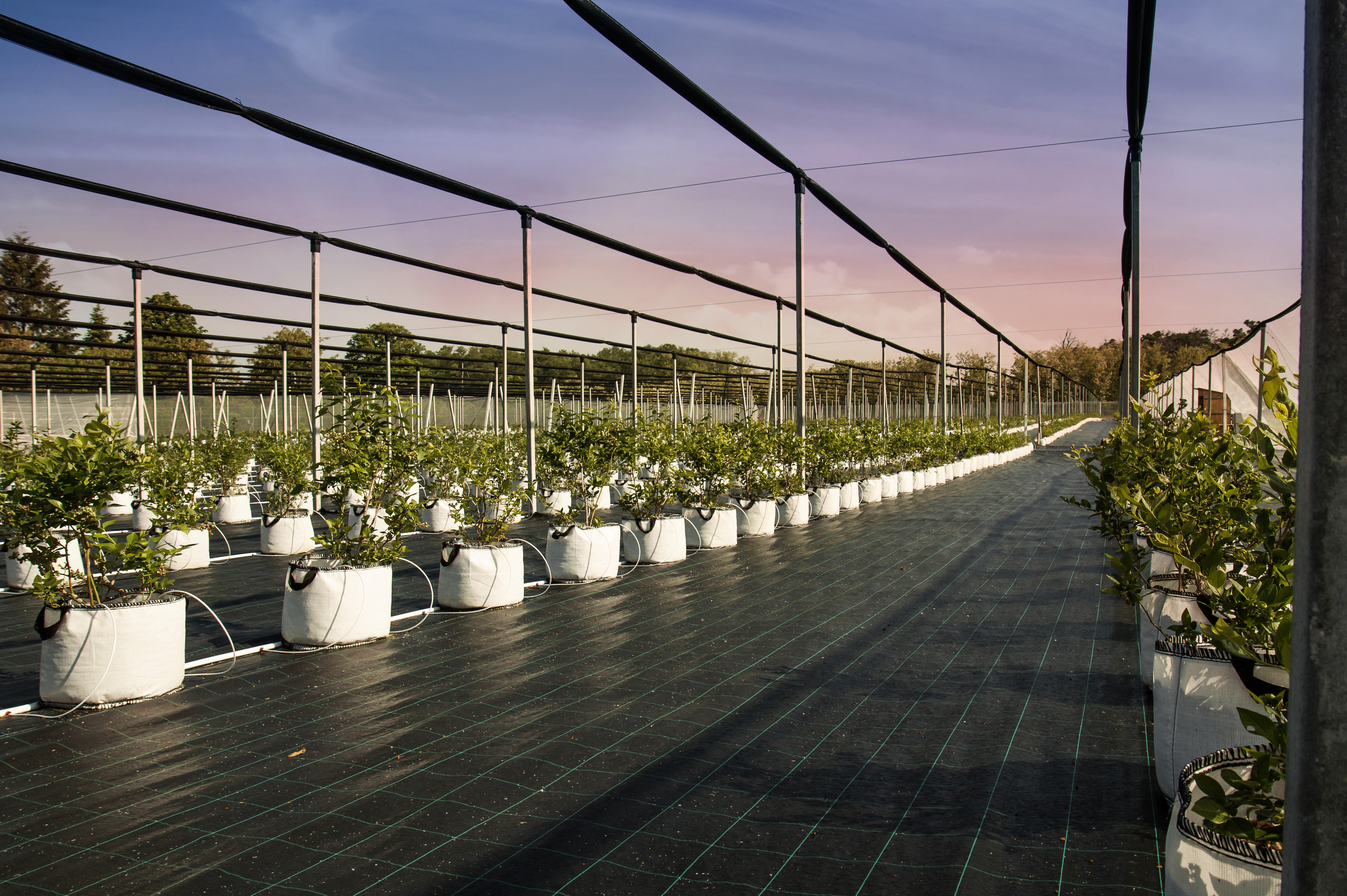 Čučoriedková farma v Devínskom jazere